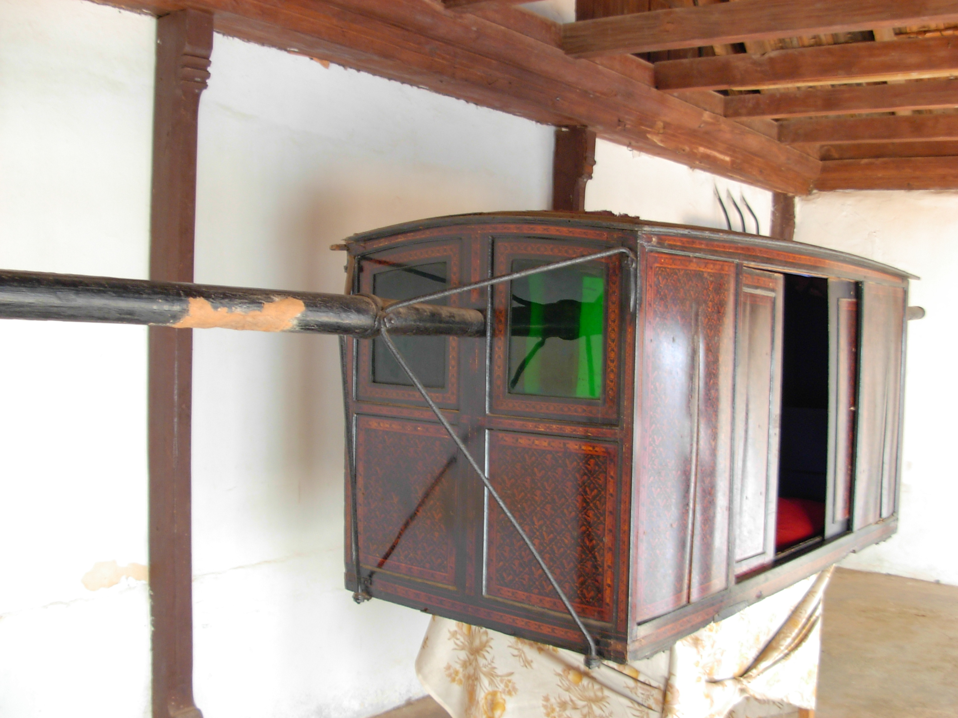 കായംകുളം കൃഷ്ണപുരം കൊട്ടാരത്തിൽ പ്രദർശിപ്പിച്ചിട്ടുള്ള പല്ലക്ക്.